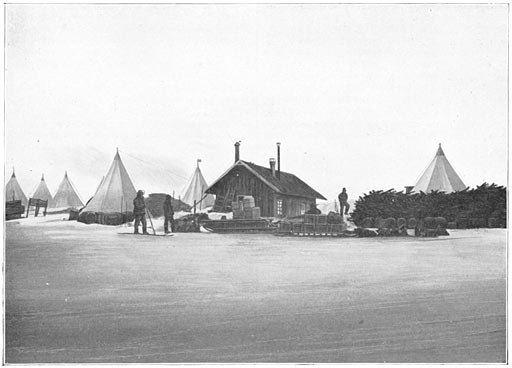 Aan de Zuidpool